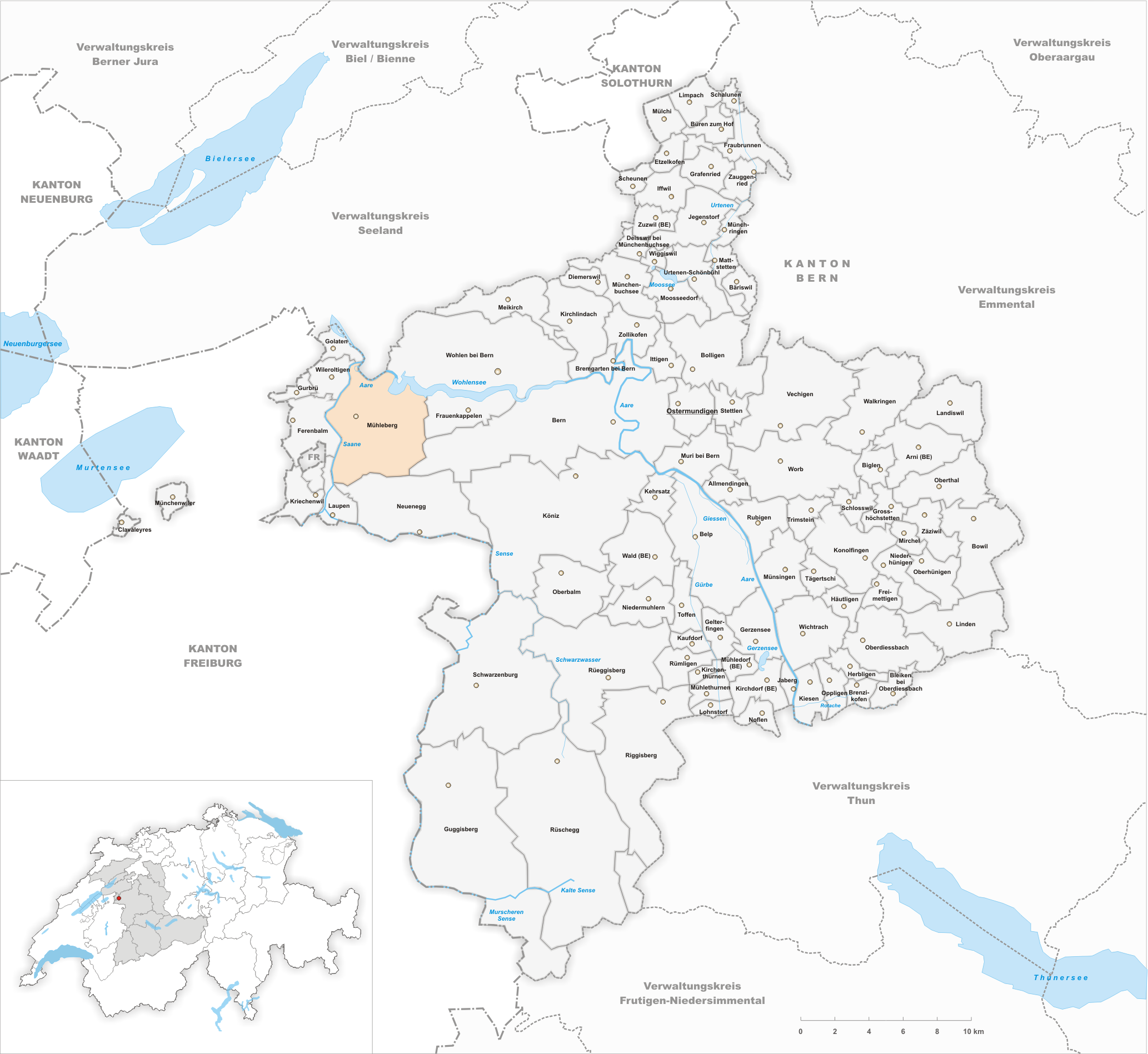 Municipality Mühleberg